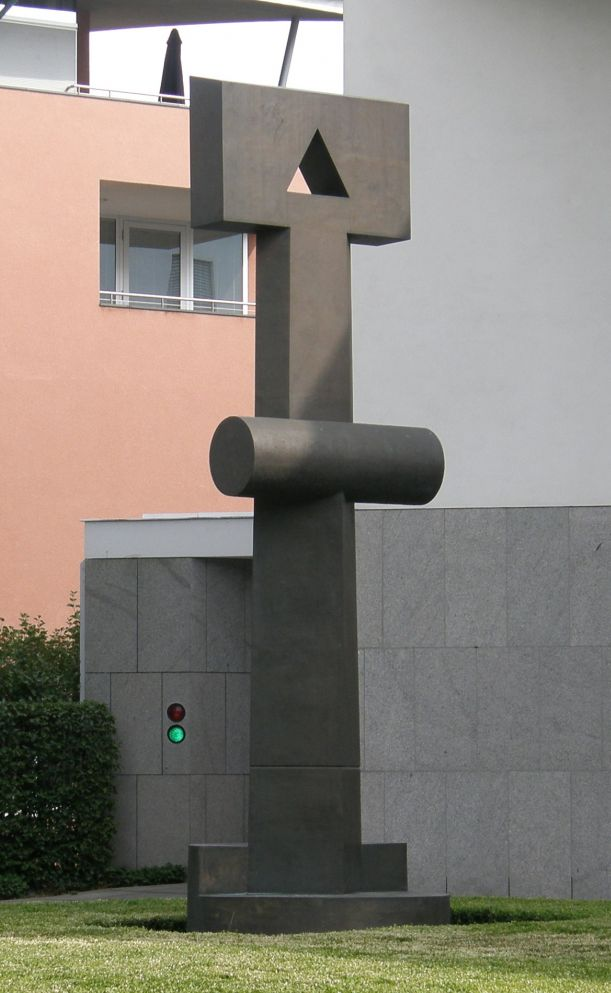 Otto Herbert Hajek: Wegzeichen 3a. 1990—1997, Bronze. Landesvertretung Baden-Württemberg, Tiergartenstraße 15, Berlin-Tiergarten